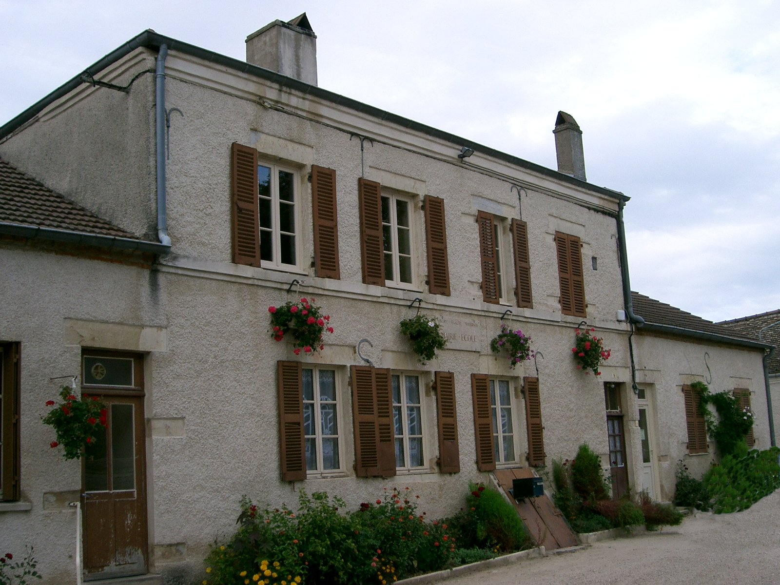 Chivres (France - 21) - Mairie-école self made PRA